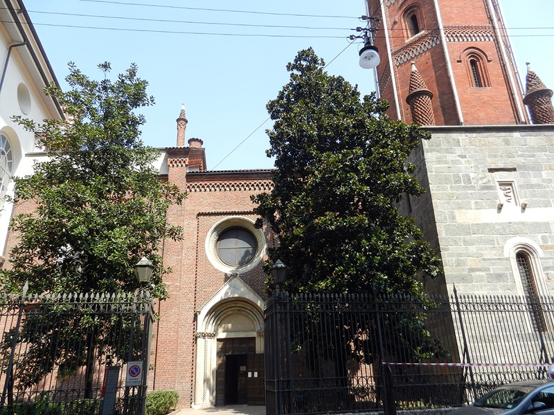 Milano - Ingresso della Chiesa di S. Gottardo in Corte